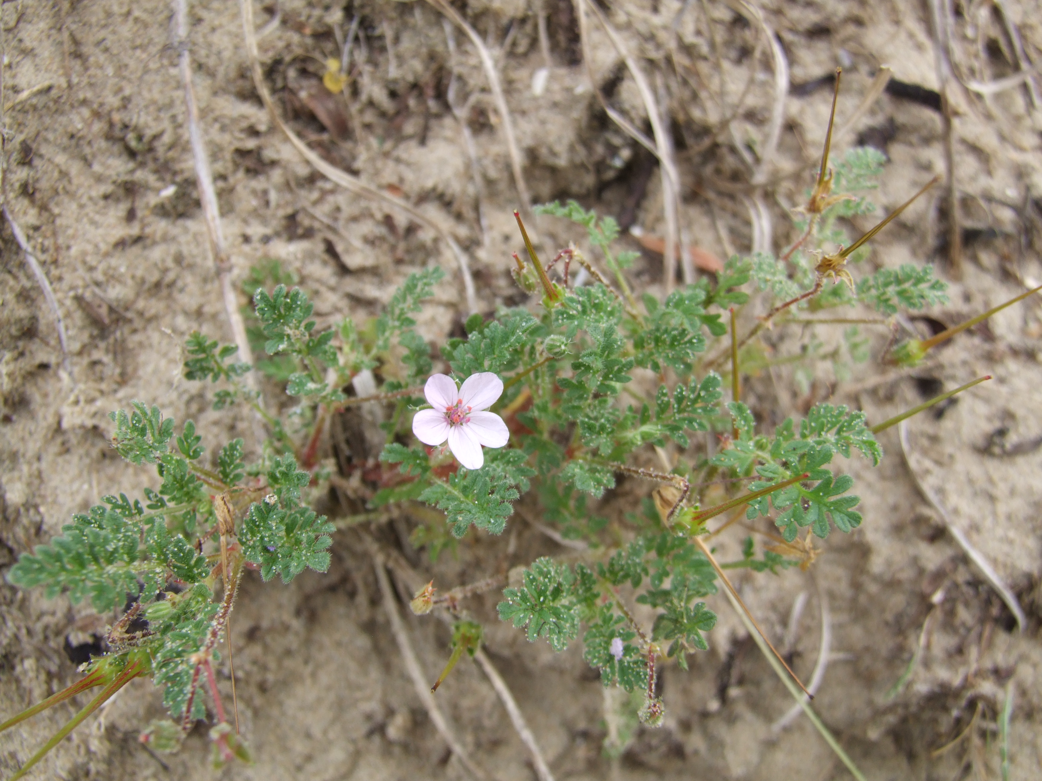 Ort: Erodium lebelii - Drüsige Hirtennadel - Kleverige reigersbek - Le Bec de cigogne des dunes Dune du Perroquet, Bray-Dunes, Frankreich - ganze Pflanze von oben mit einer Blüte